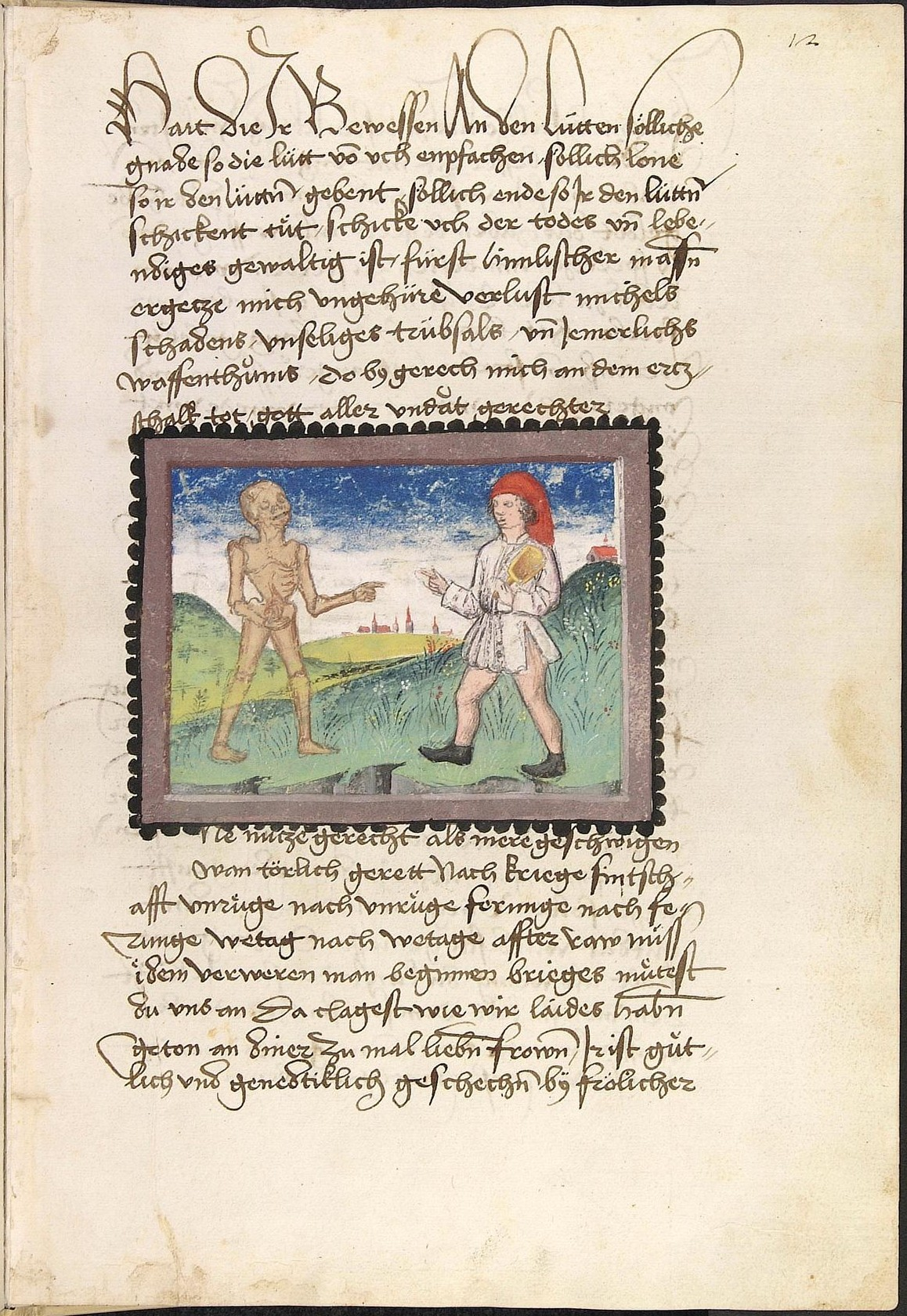 Codex Palatinus germanicus 76, Blatt 12r - Johannes von Tepl: Der Ackermann aus Böhmen - Der Tod betont seine uneingeschränkte Macht